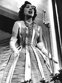 Franca Raimondi al Festival di Sanremo 1956